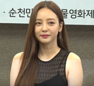 제6회 순천만세계동물영화제 홍보대사 위촉식 구하라